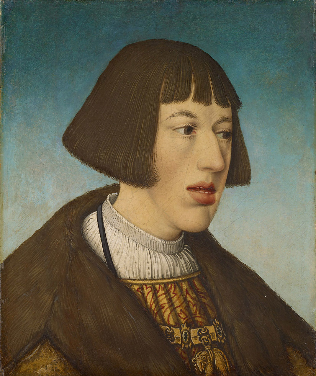 Abgebildete Person:Kaiser Ferdinand I. Sohn des Philipp von Habsburg Österreich